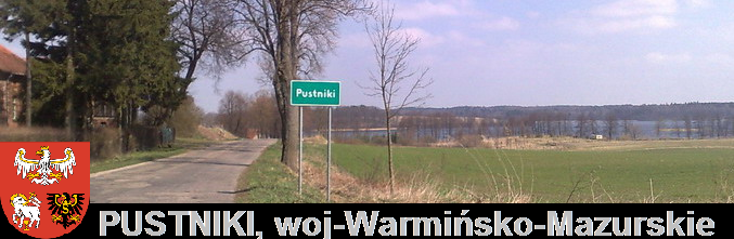 Widok Pustnika